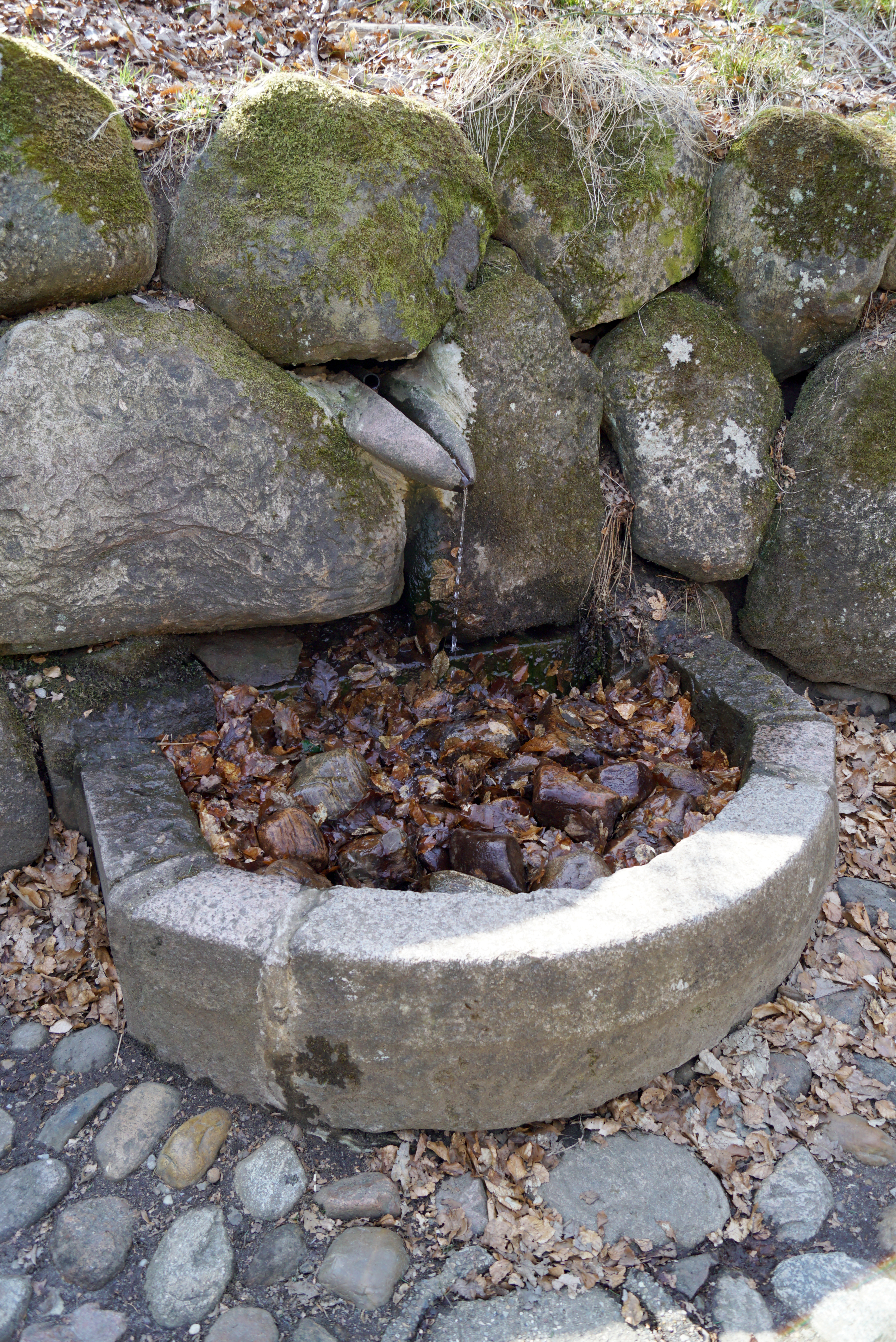 Skt Sørens Kilde er en helligkilde der ligger i Rye Sønderskov ved Gammel Rye